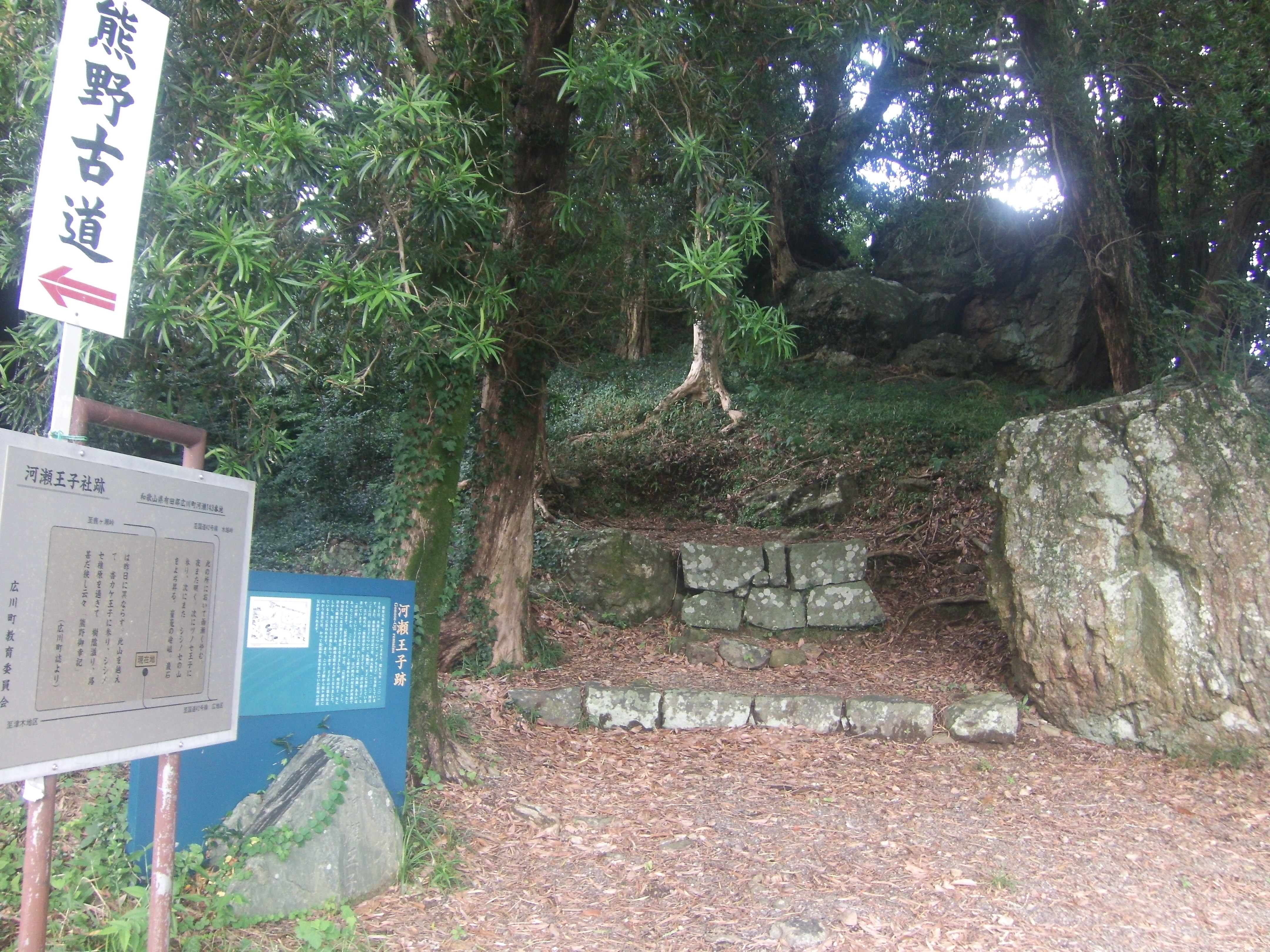 熊野古道・紀伊路の九十九王子の一つ河瀨(ごのせ)王子(和歌山県広川町）